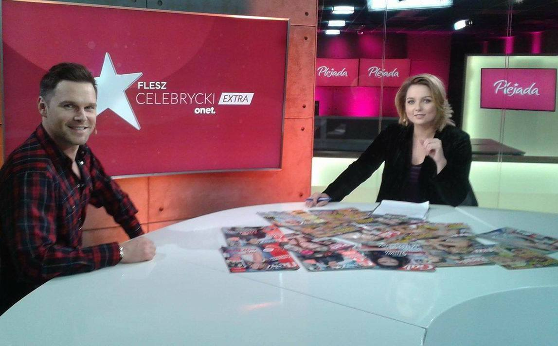 Polski aktor Marek Kaliszuk i dziennikarka Anna Matusiak na planie programu "Flesz Celebrycki Extra" w 2016 roku.